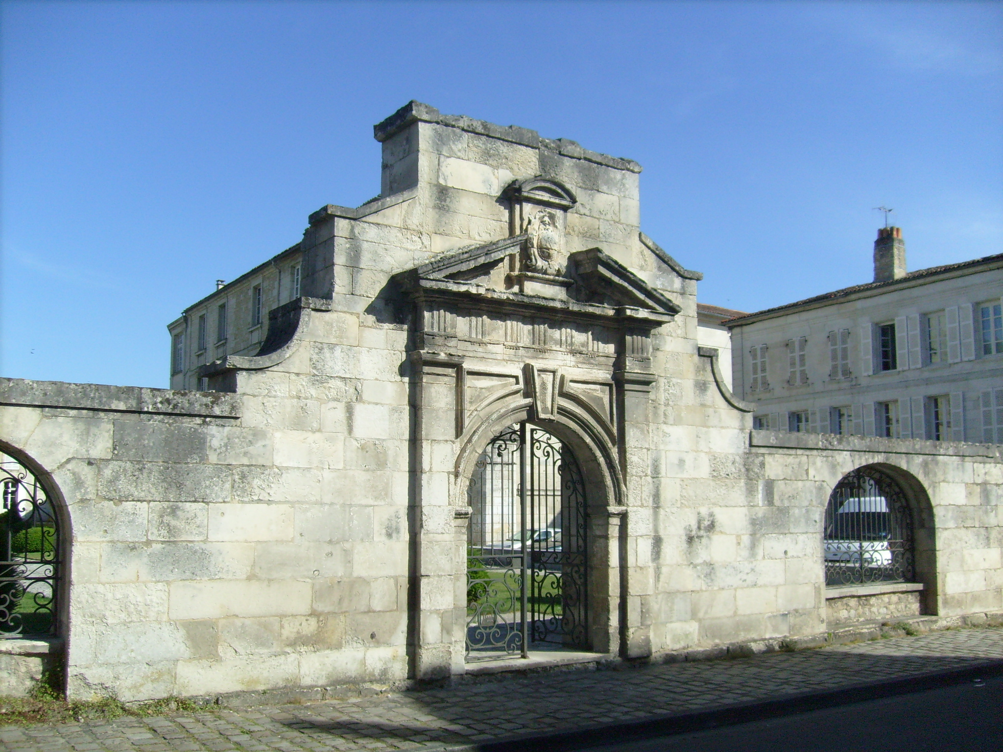 Vestiges de la chapelle des Jésuites de Saintes